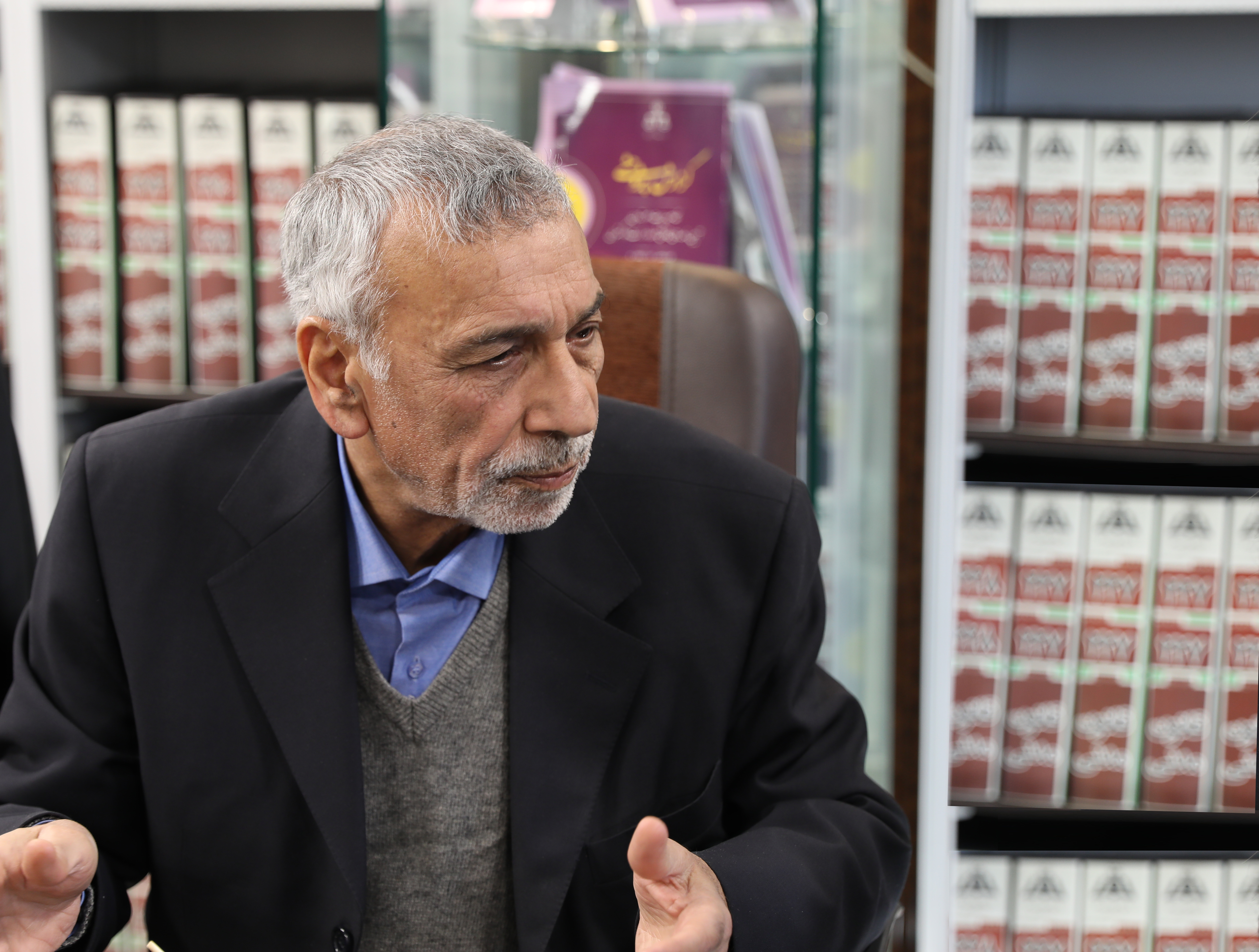 حسین مهرپور در مرکز پژوهشی دانشنامه های حقوقی علامه